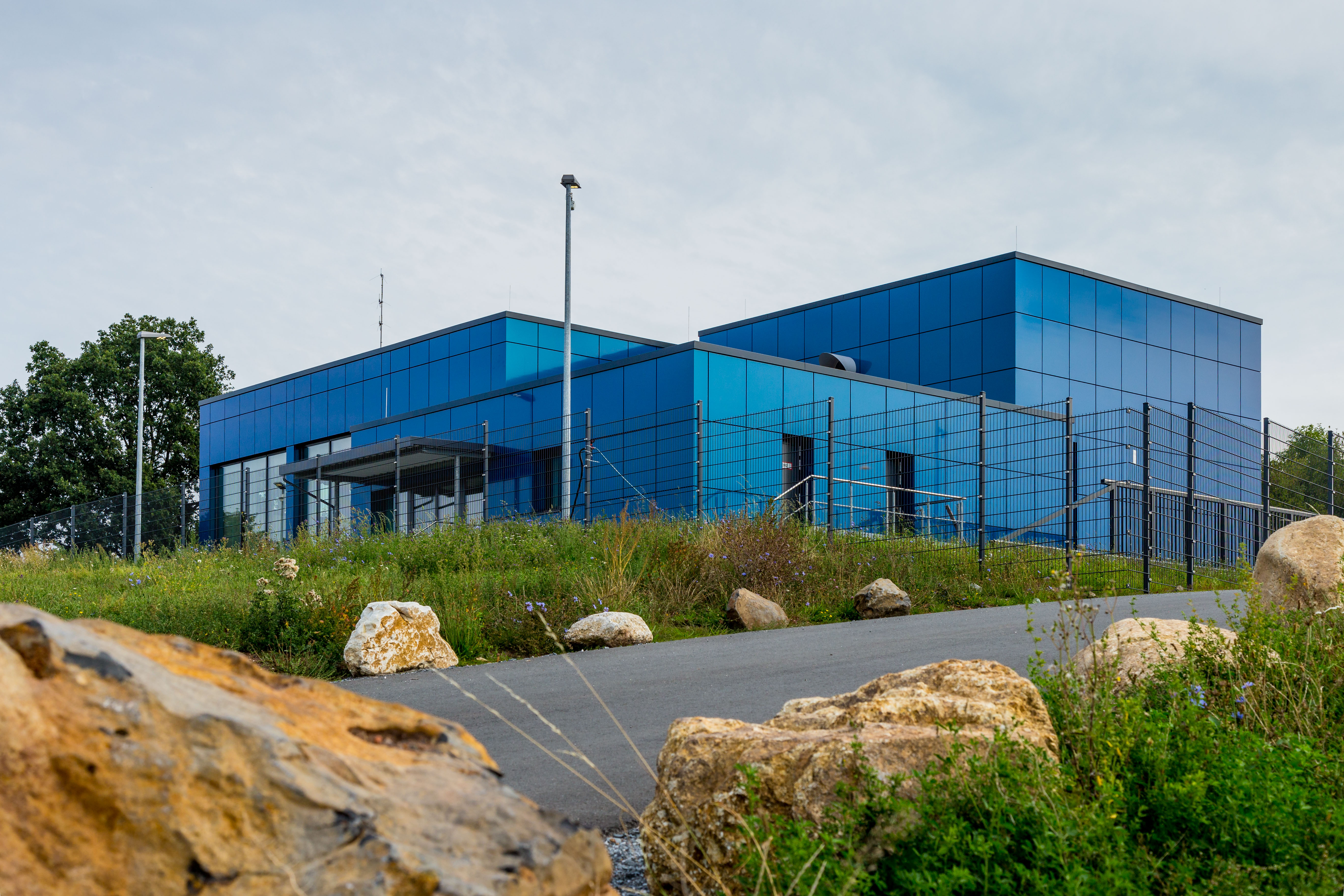 Die Stadtwerke Bayreuth haben das Wasserwerk auf dem Eichelberg zwischen 2017 und 2019 erneuert. Besonders markant ist die neue Alu-Fassade, die auch von der Autobahn A9 aus zu sehen ist.